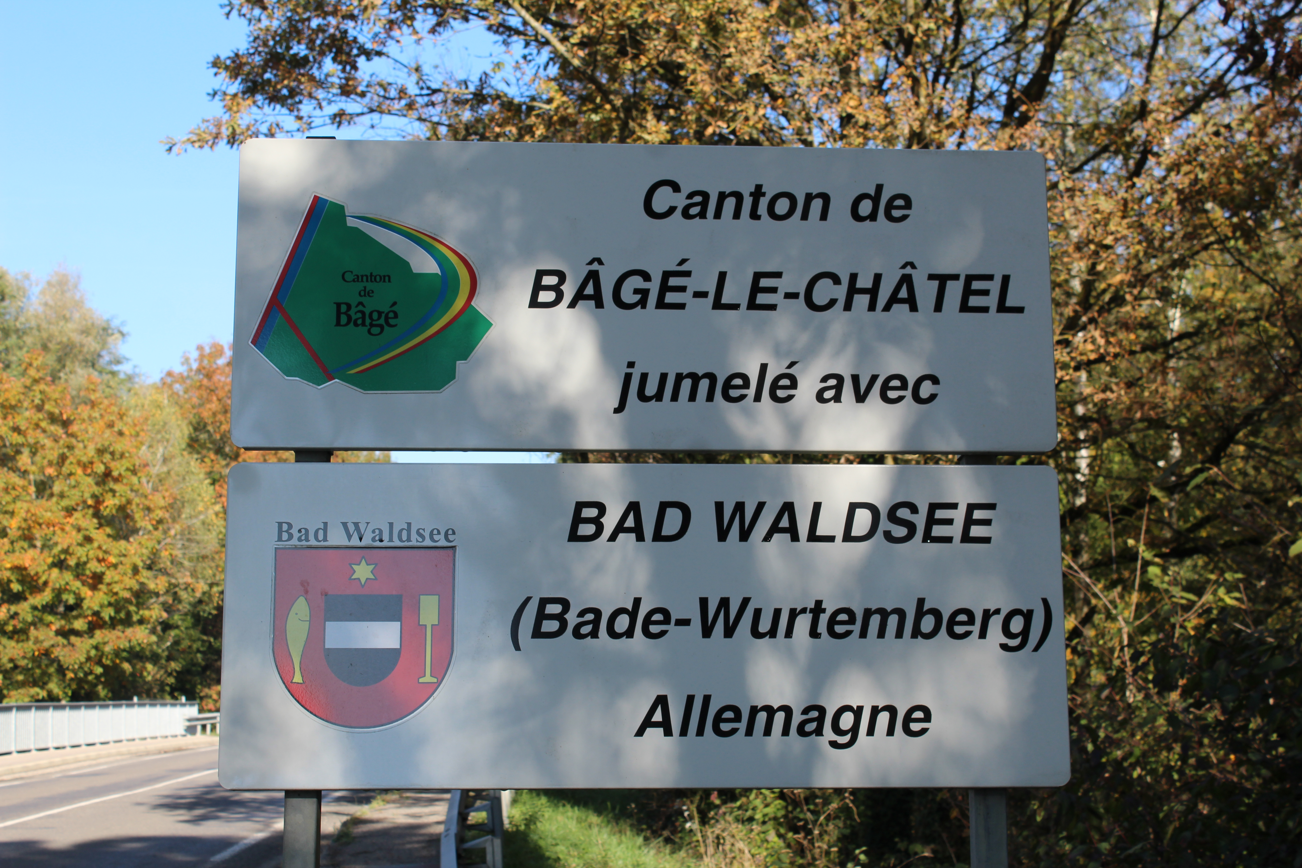 Panneau de jumelage entre le canton de Bâgé-le-Châtel et Bad Waldsee à Saint-André-de-Bâgé.